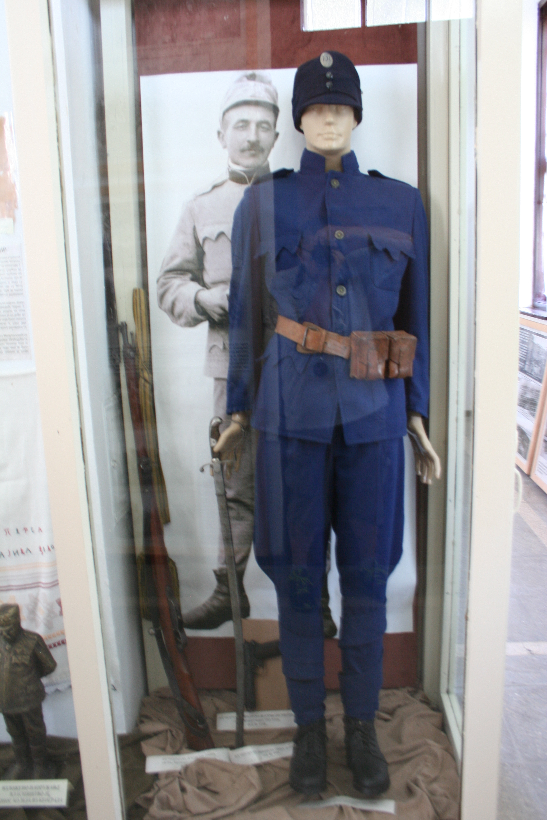 Spomen-kosturnica na Ceru